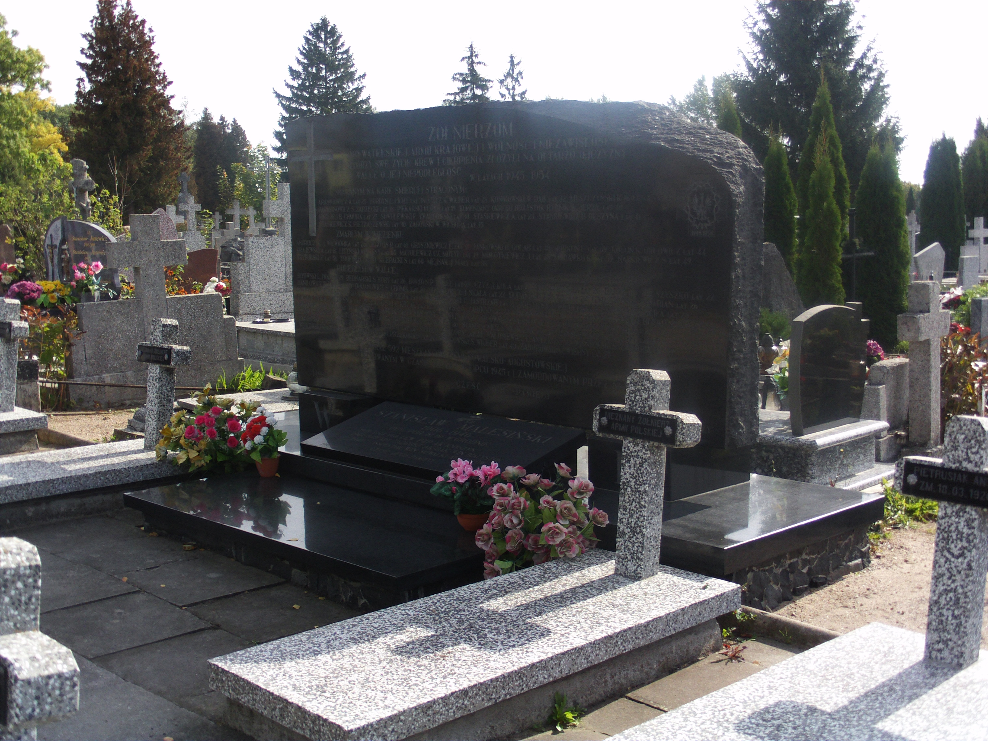 Cmentarz Rzymskokatolicki w Suwałkach